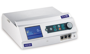 equipos de tecarterapia de primera generacion